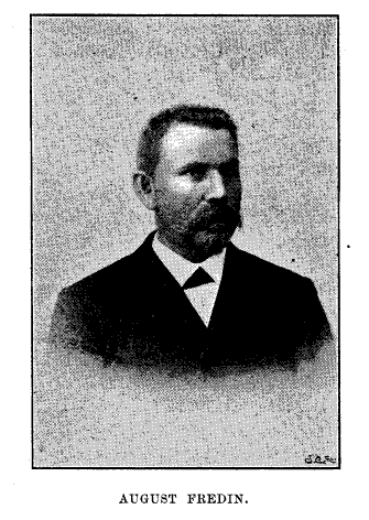 August Fredin i Svensk Läraretidning 1903.